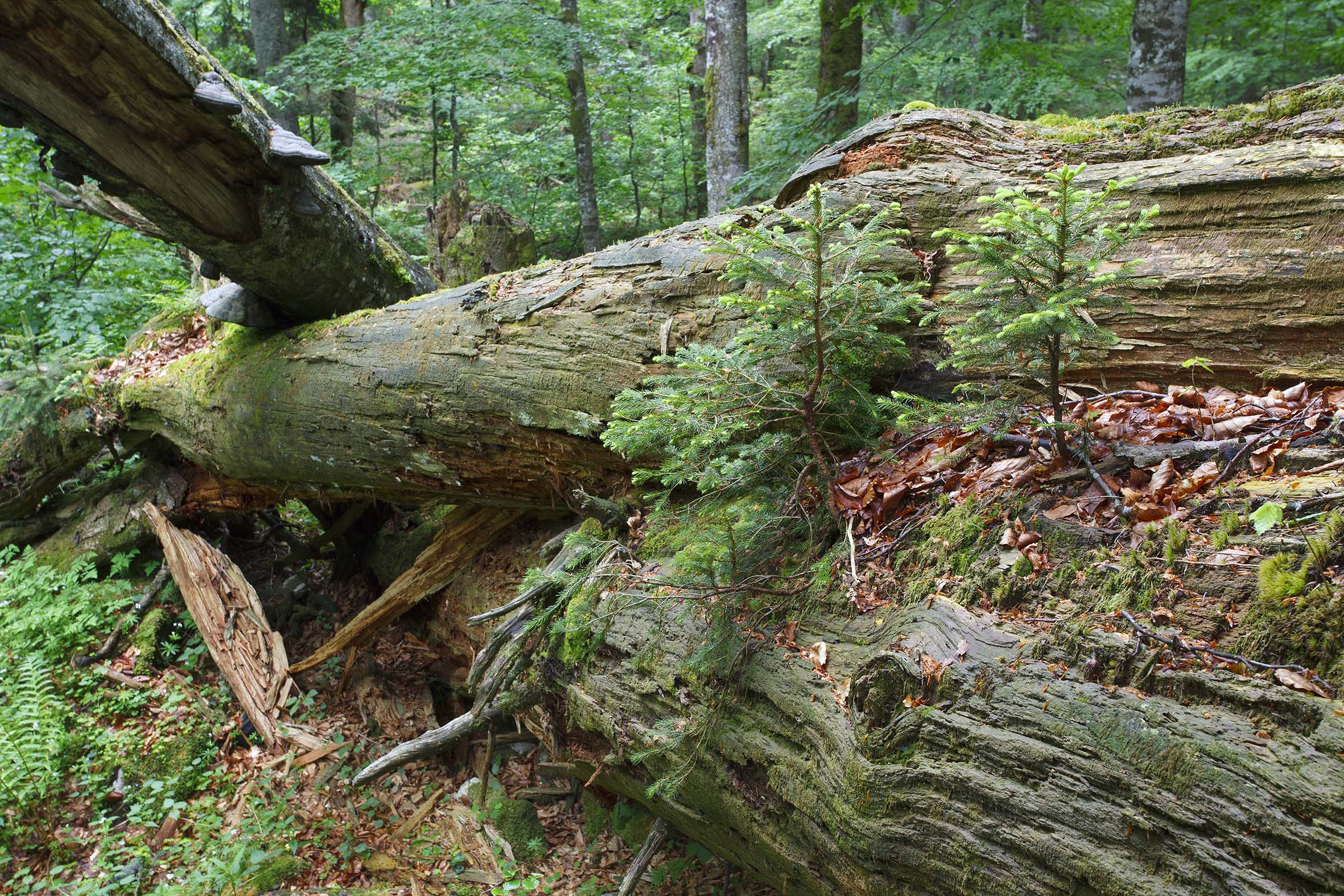 Rothwald